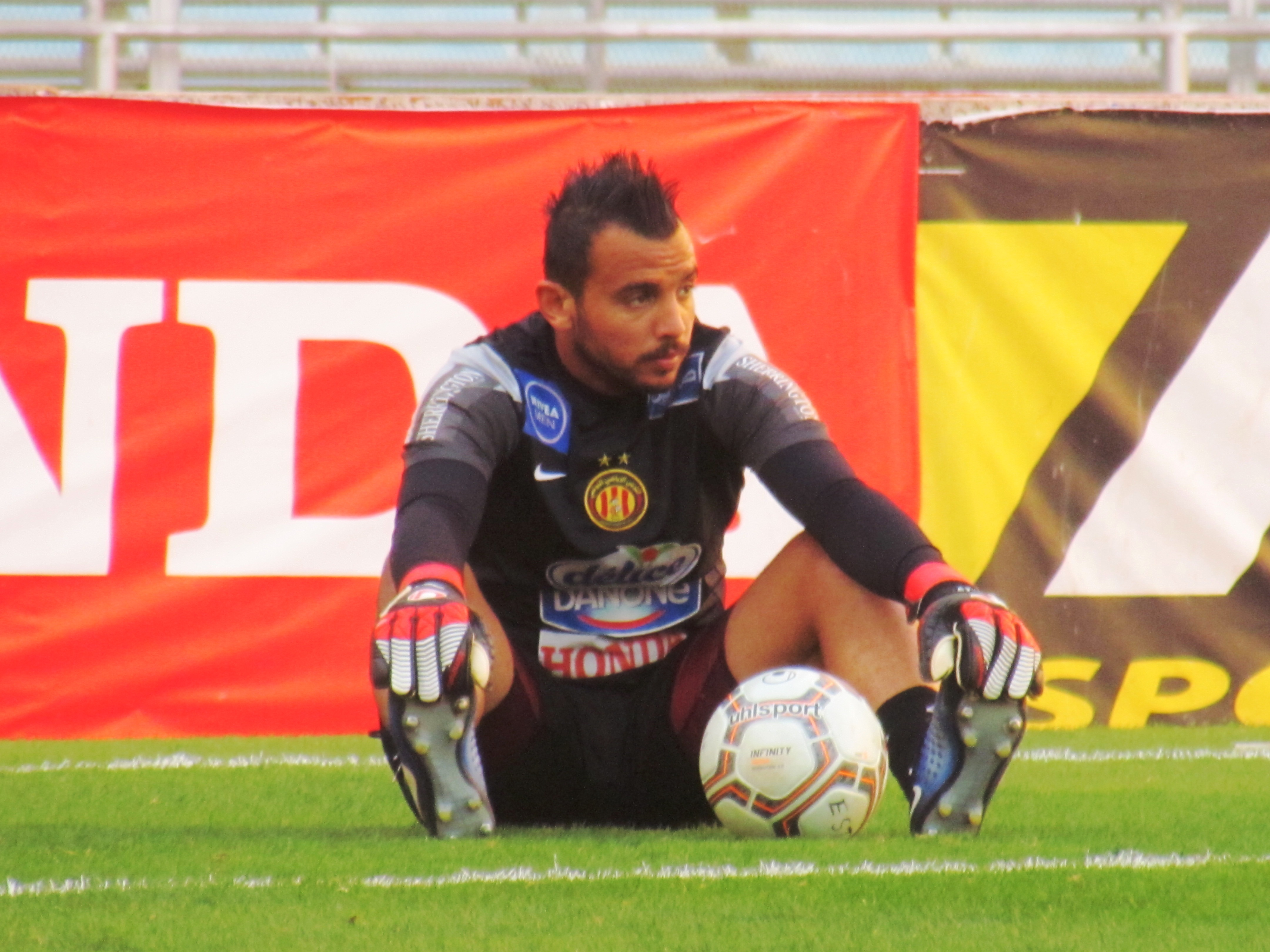 Moez Ben Chrifia lors de l'échauffement avant le match du huitième de finale de la Ligue des Champions de la CAF 2017 le 11 mars 2017 contre Horoya Conakry (Guinée)